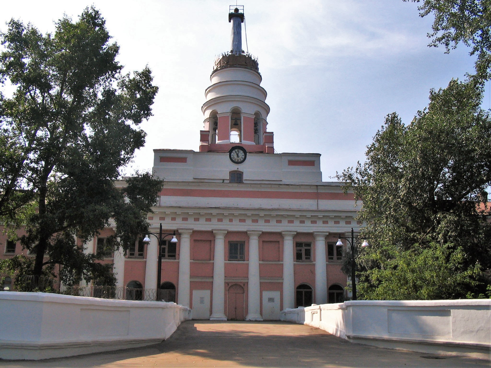 Mil Plant in Izhevsk